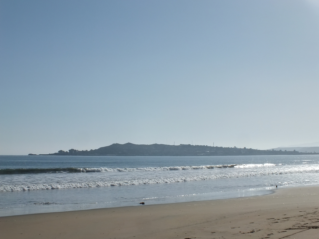 Vista de Playa grande, con la peninsula de Tongoy hacia el fondo de la Bahia.